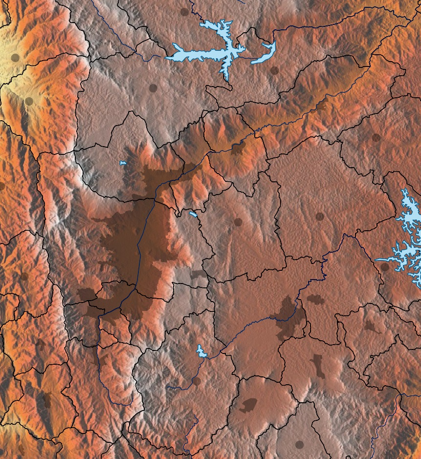 Mapa del Valle de Aburrá